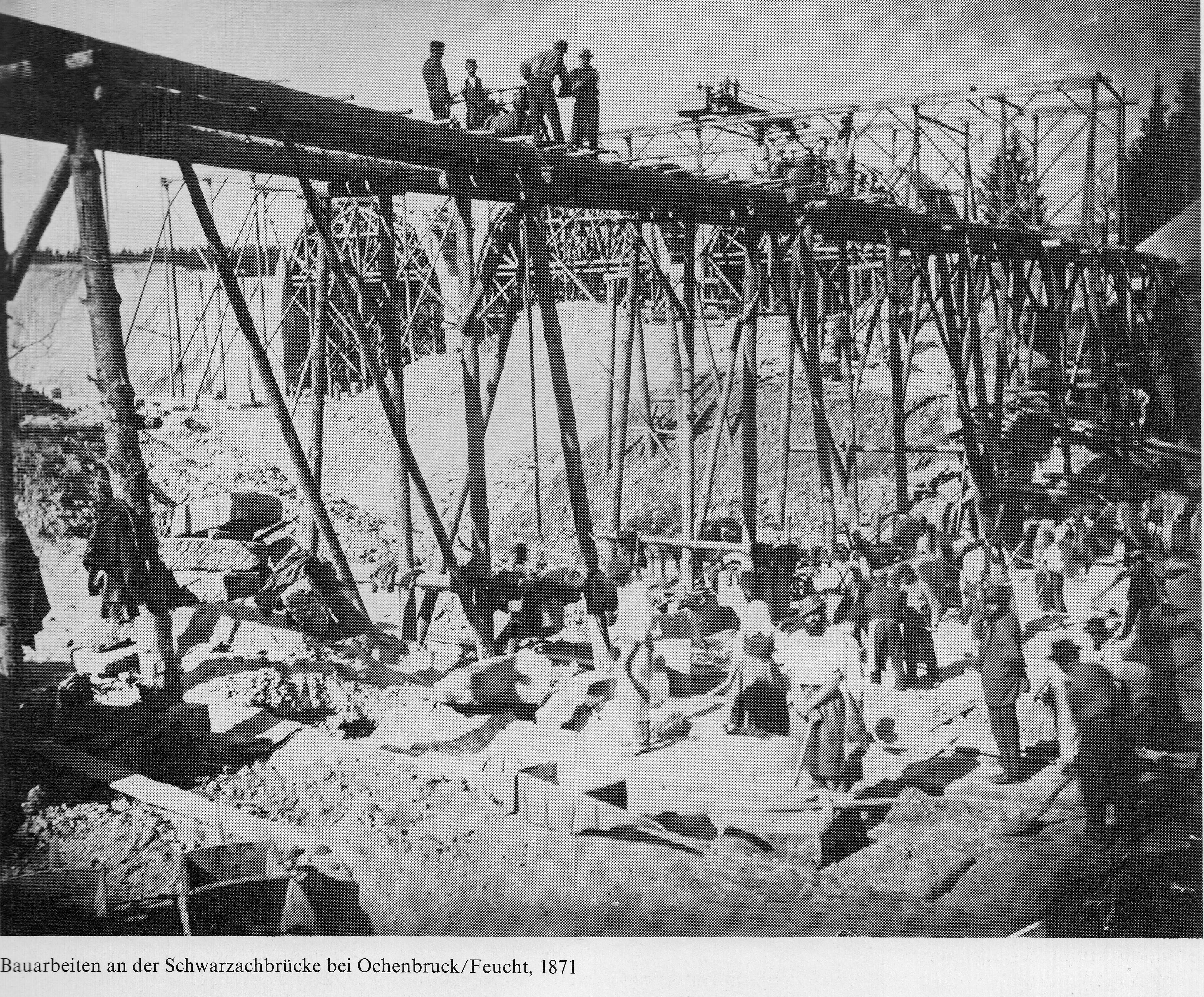 Der Bau der Eisenbahnbrücke über die Schwarzach in Ochenbruck im Jahr 1871